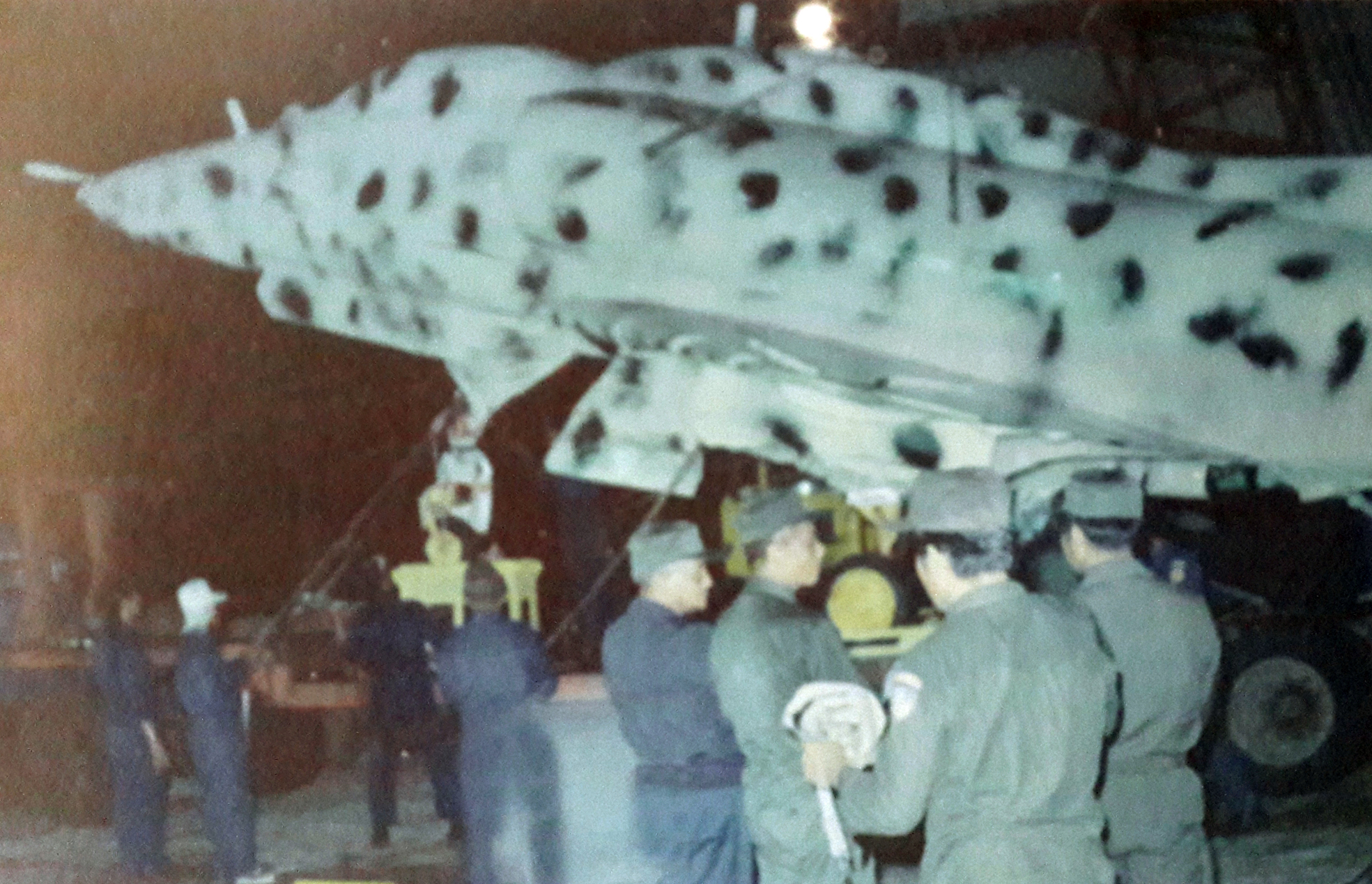 A-4 Skyhawk TNI AU sedang dikeluarkan dari kapal laut di Pelabuhan Tanjung Priok